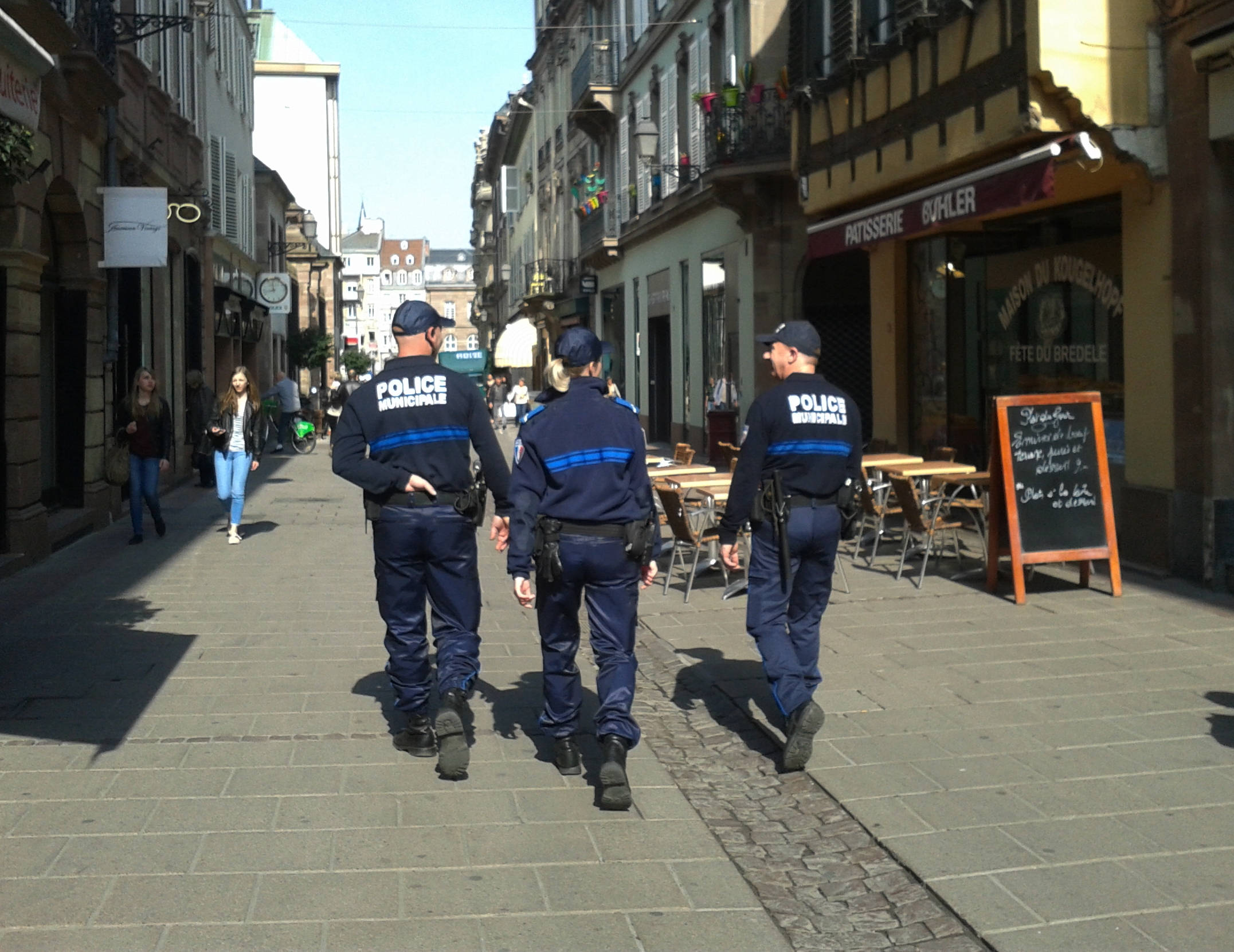 Policiers municipaux à Strasbourg